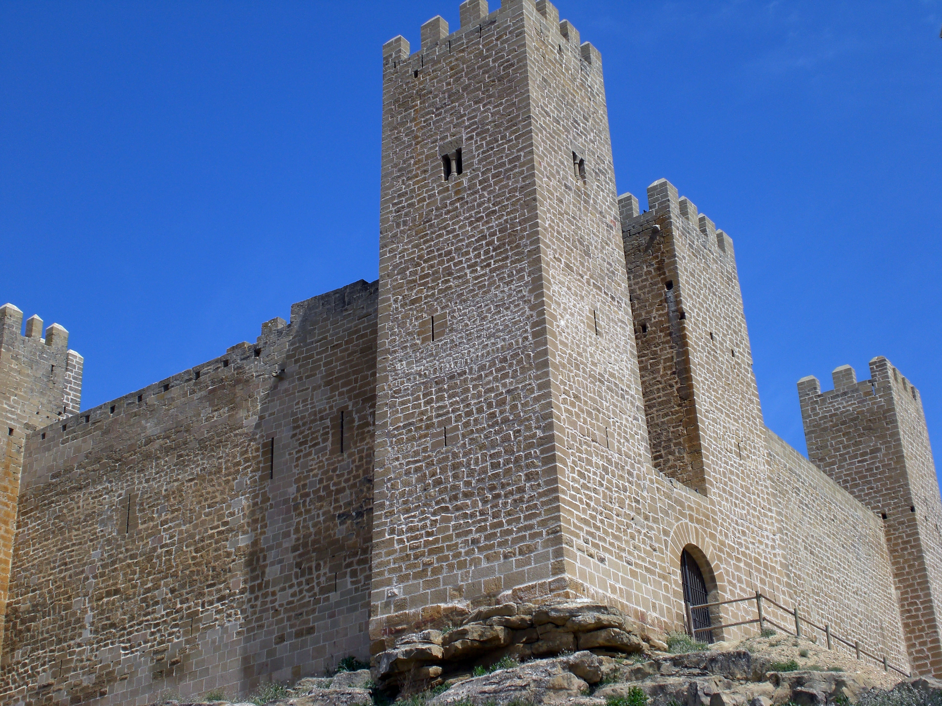 Castillo de Sádaba